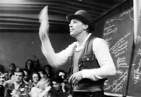 Joseph Beuys on his lecture "Jeder Mensch ein Künstler - Auf dem Weg zur Freiheitsgestalt des sozialen Organismus" photographed by Rainer Rappmann in Achberg / Germany 1978